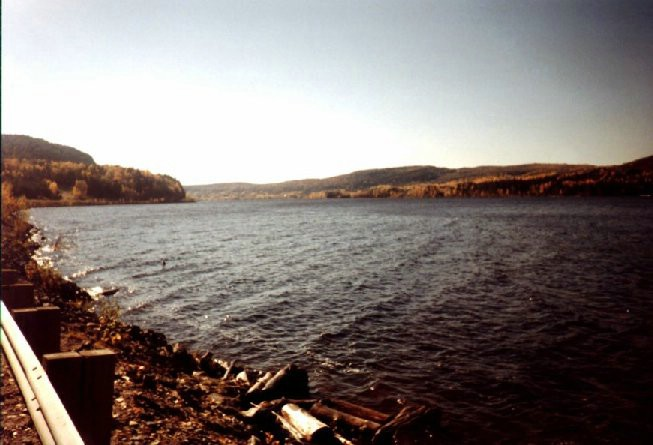 Vue sud de la baie du Saint-Maurice, juste au nord des Piles.